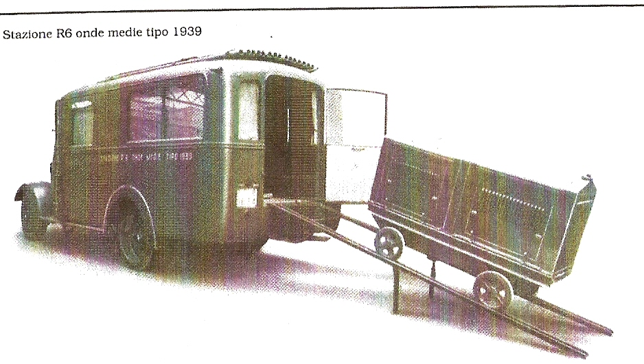 La Radio R6 onde corte, modello di quella presente a Bortigali nel 1943 e dalla quale partirono le prime trasmissioni di Radio Sardegna.